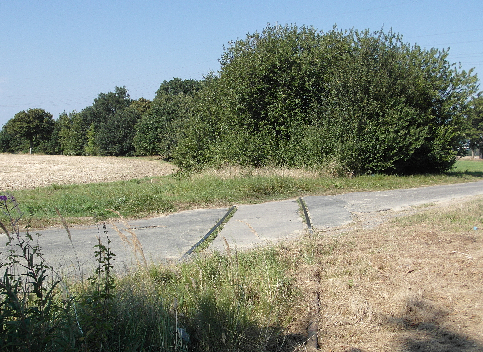 Das 1950 gebaute, seit Jahrzehnten ungenutzte Anschlussgleis von Barsinghausen zum Schacht IV ist inzwischen mit Bäumen und Gebüschen zugewuchert